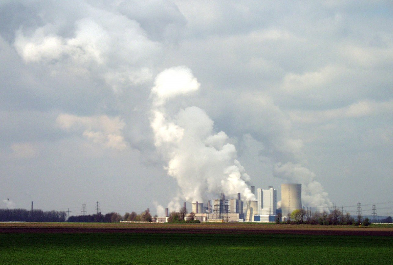 Braunkohlekraftwerk Niederaußem bei Köln